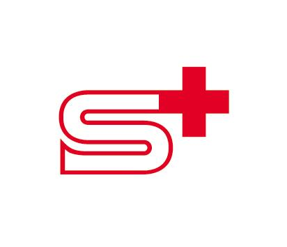 Logo des Samaritains suisses